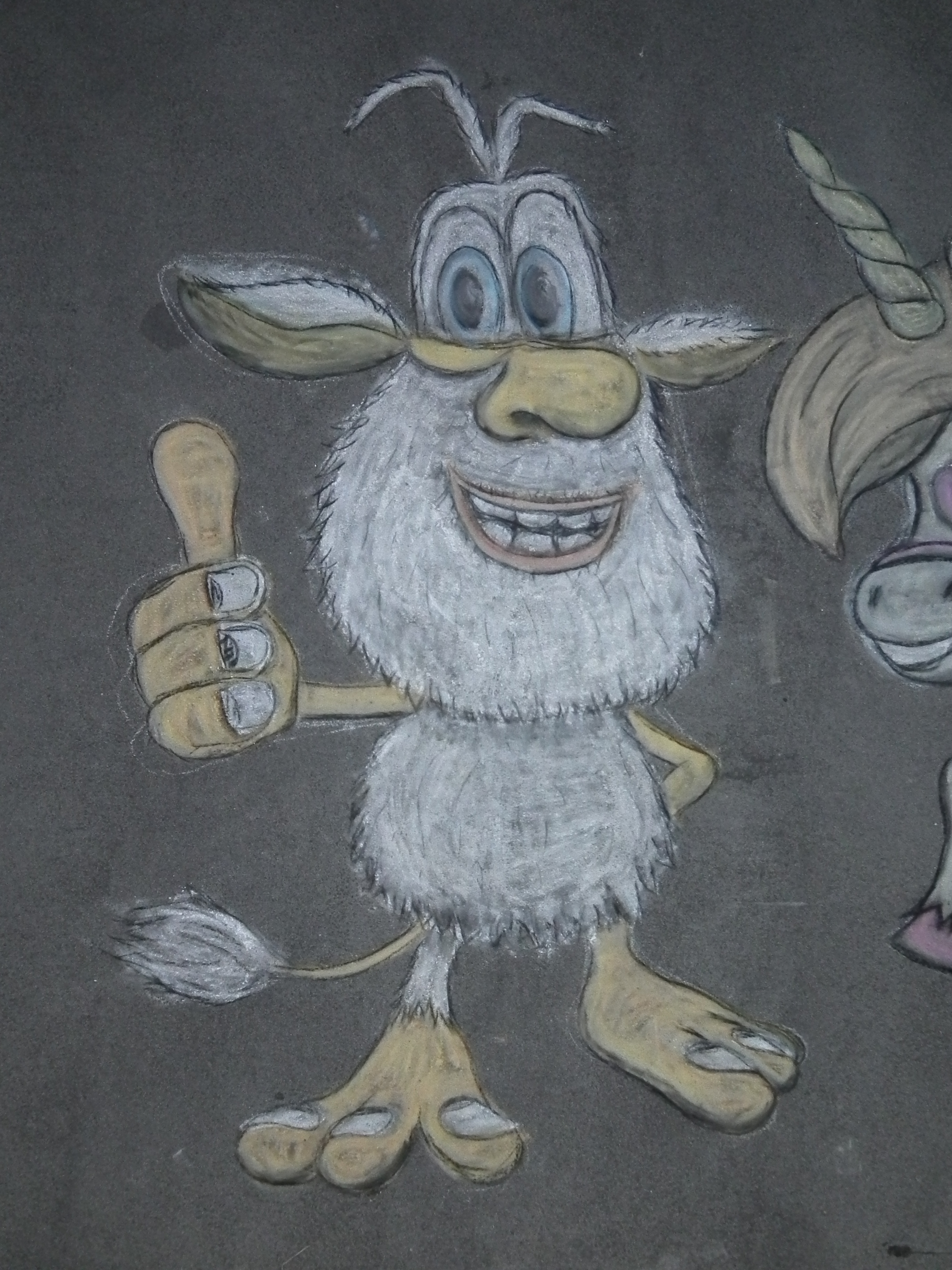 Streetart in Dresden, Kreidebild Booba